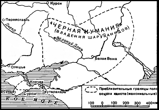 Черная Кумания - половецкое ханство во главе с Шаруканидами, которое объединяло донецкие орды половцев. Реконструировано по схеме Б. А. Рыбакова